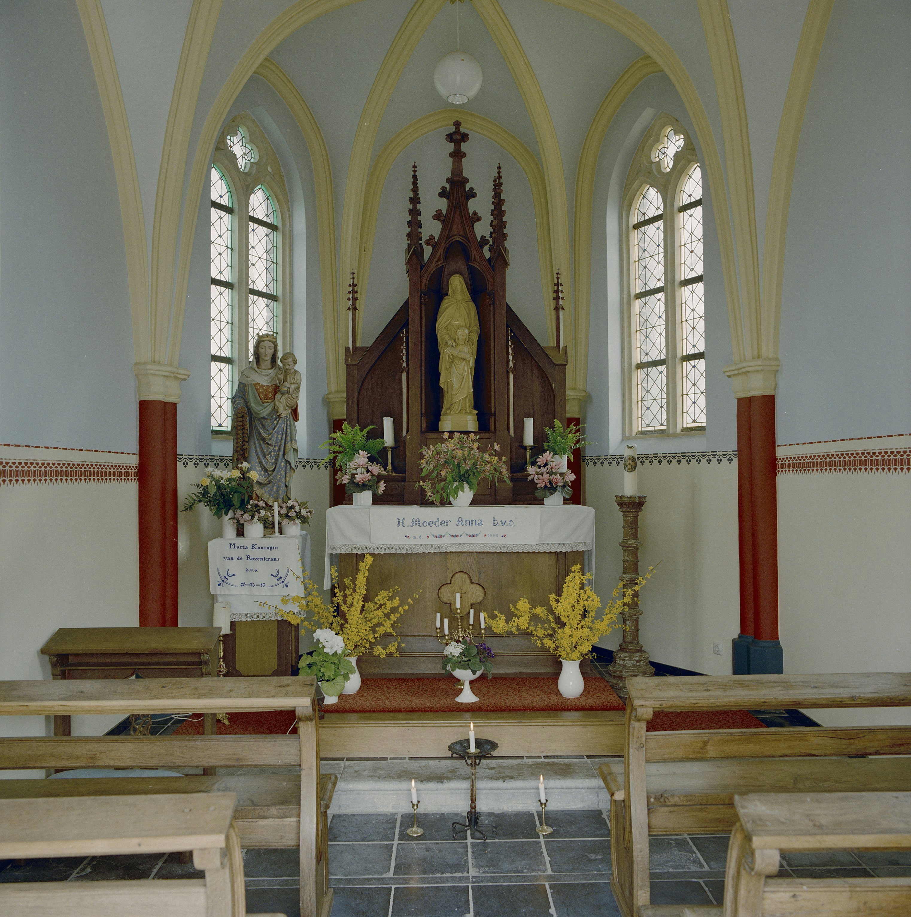 Oude Kerk Kapel: INTERIEUR, OVERZICHT NAAR HET OOSTEN